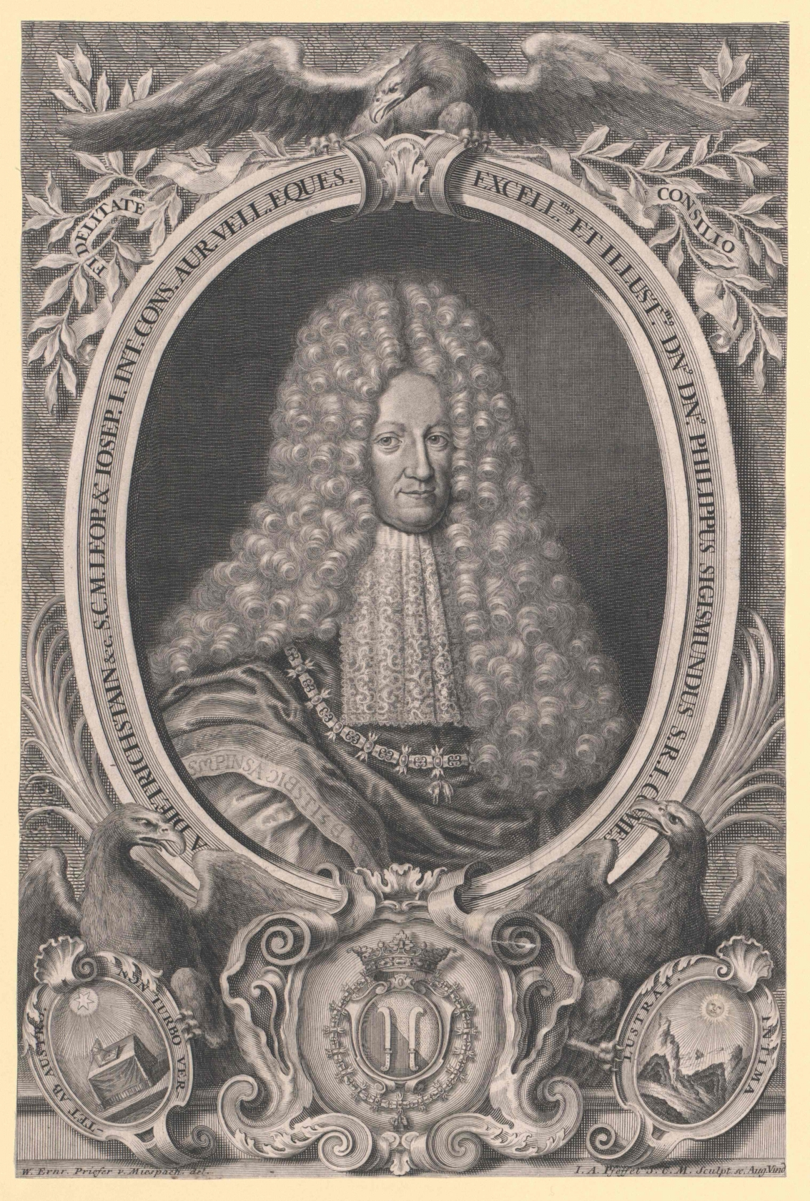 Filip Zikmund hrabě z Ditrichštejna (1651–1716)